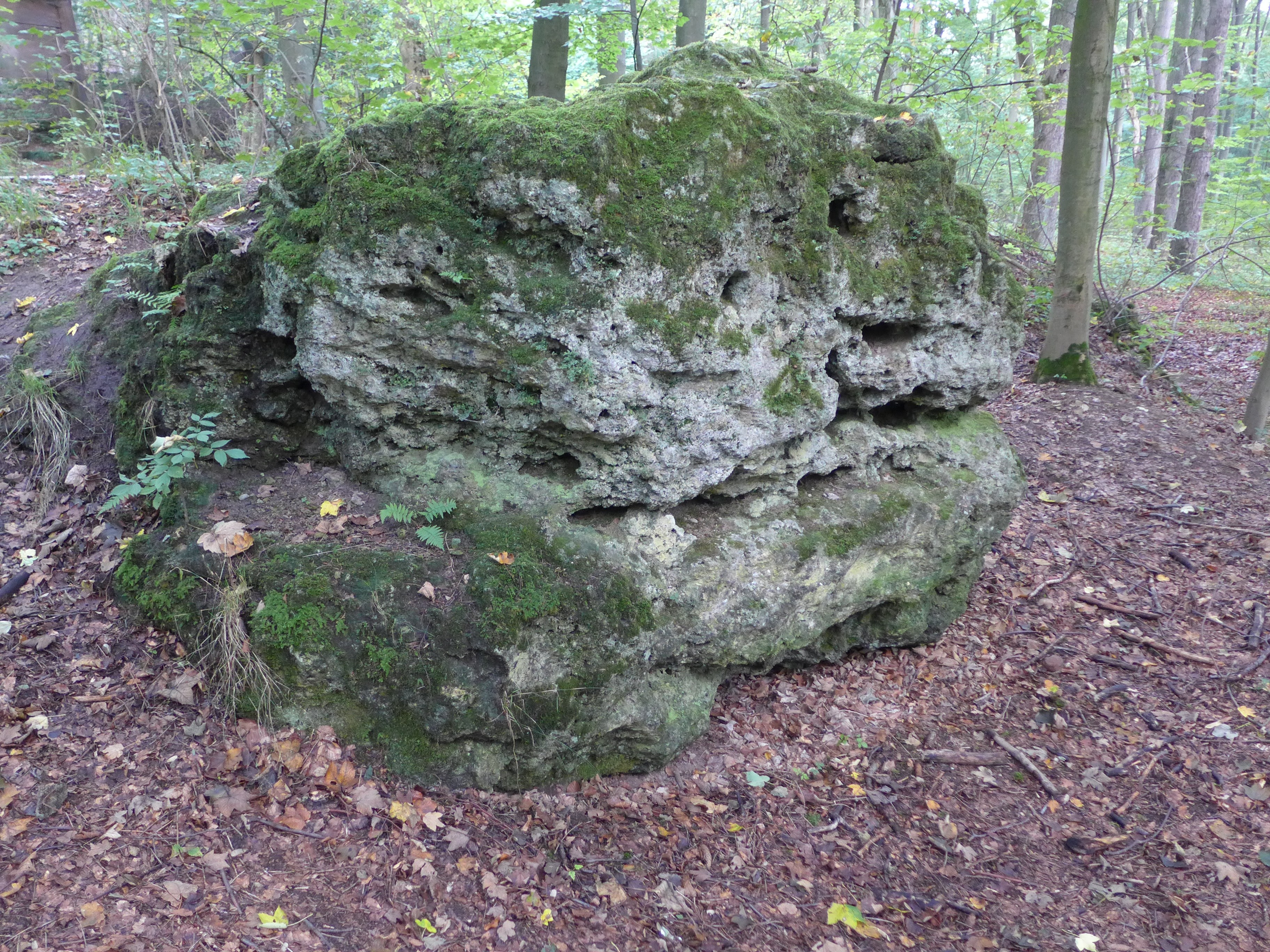 Geotop Nr. 4225/04 Naturdenkmal Nr. NOM 20